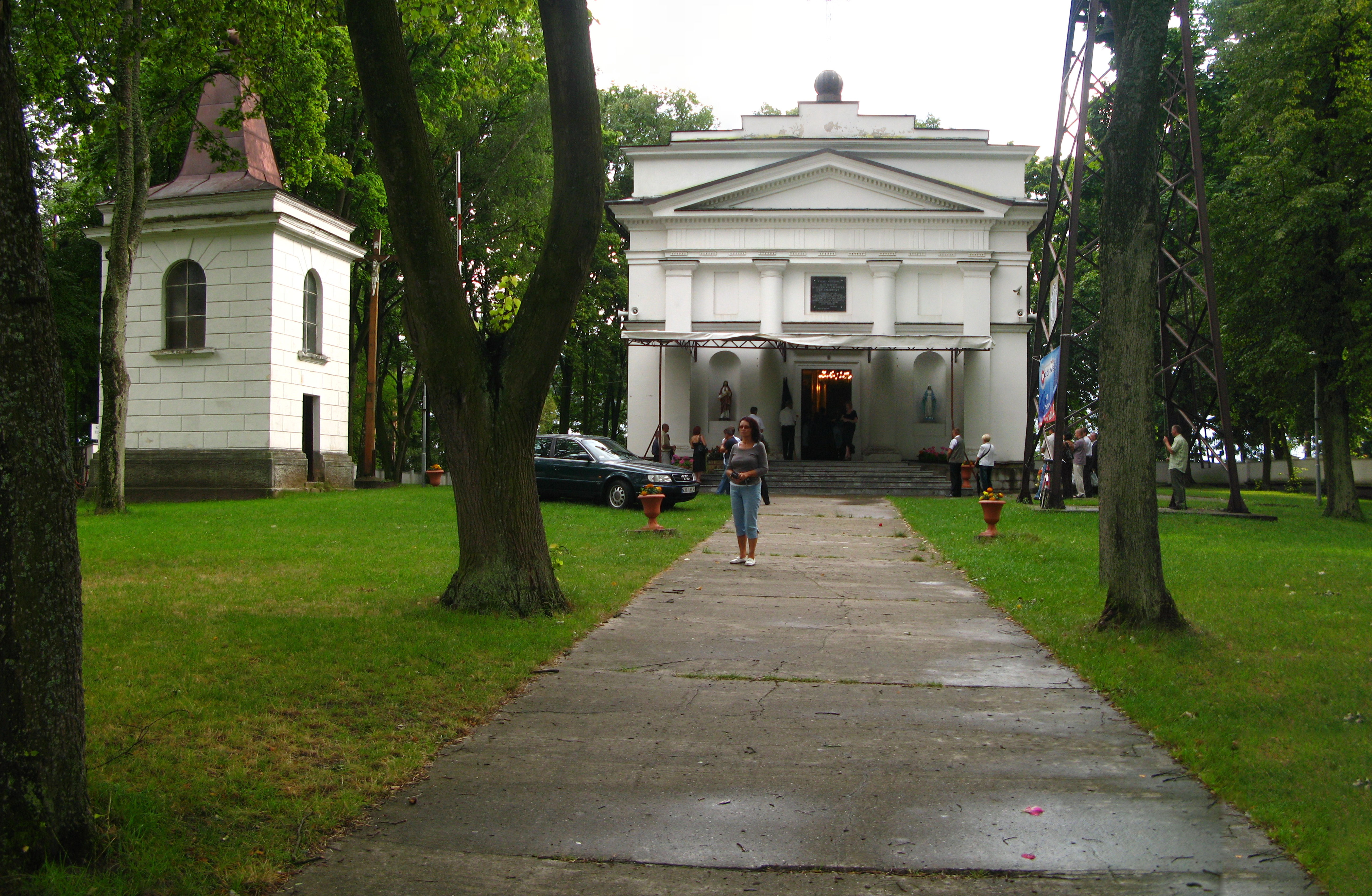 Kościół par. p.w. śś. Piotra i Pawła (1838)Dzwonnica (1838) Pratulin, gmina Rokitno 04.1966.